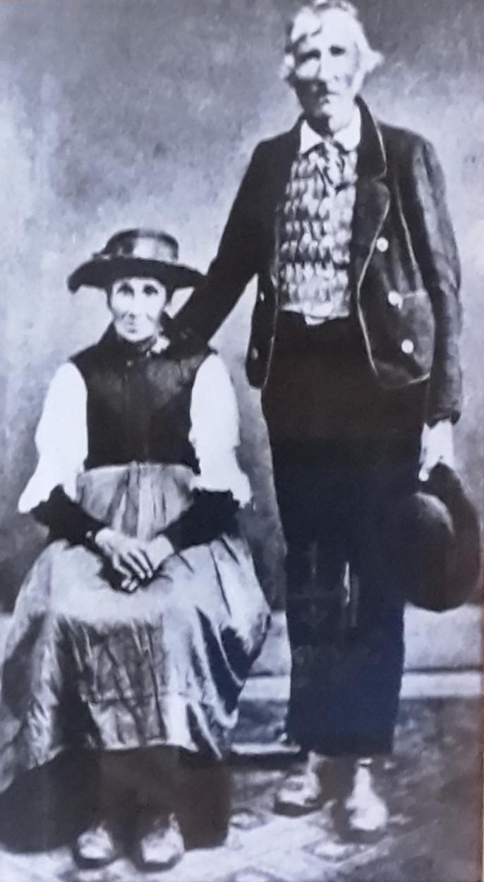 Josef Freinademetz family